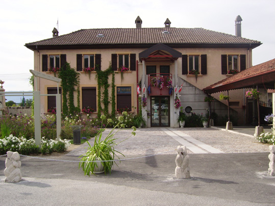 Mairie du village de Massongy